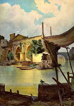 Ponte Rotto in Rome